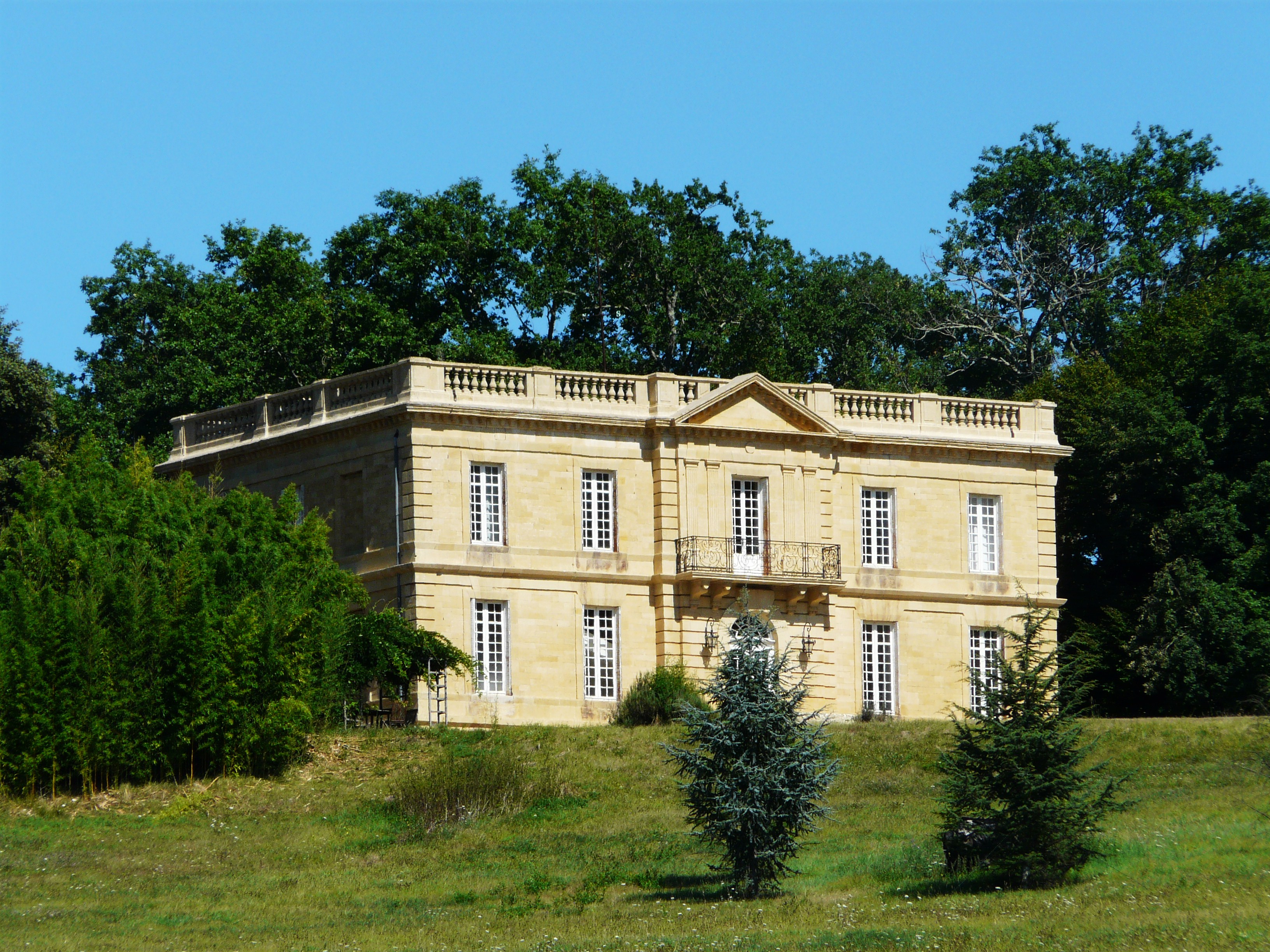 Le château du Gard au lieu-dit Fontcabrol, Calviac-en-Périgord, Dordogne, France.